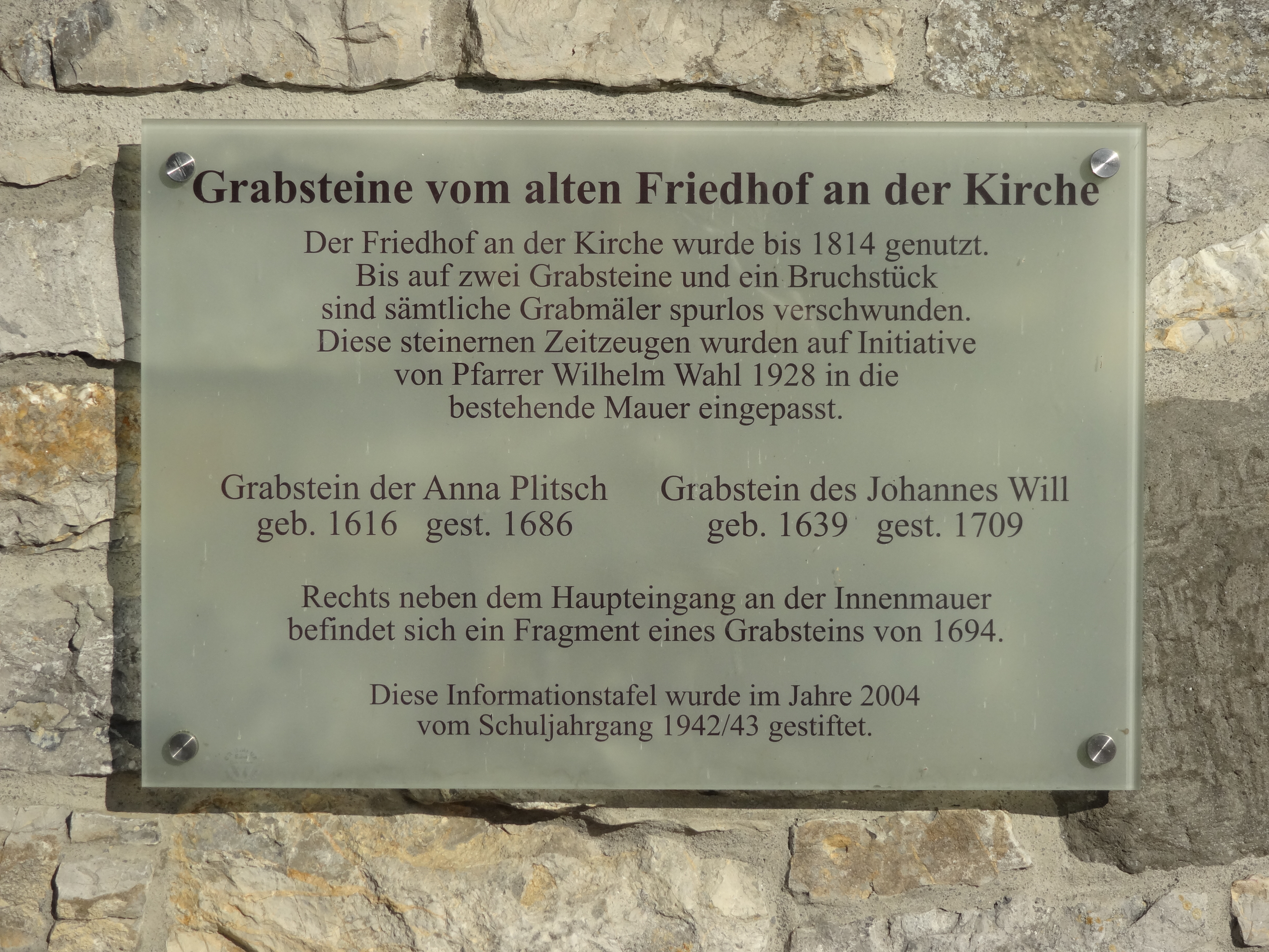 Hinweisschild zu alten Grabsteinen, Friedhofsmauer, Friedhofsweg ohne Nummer, 35428 Langgöns